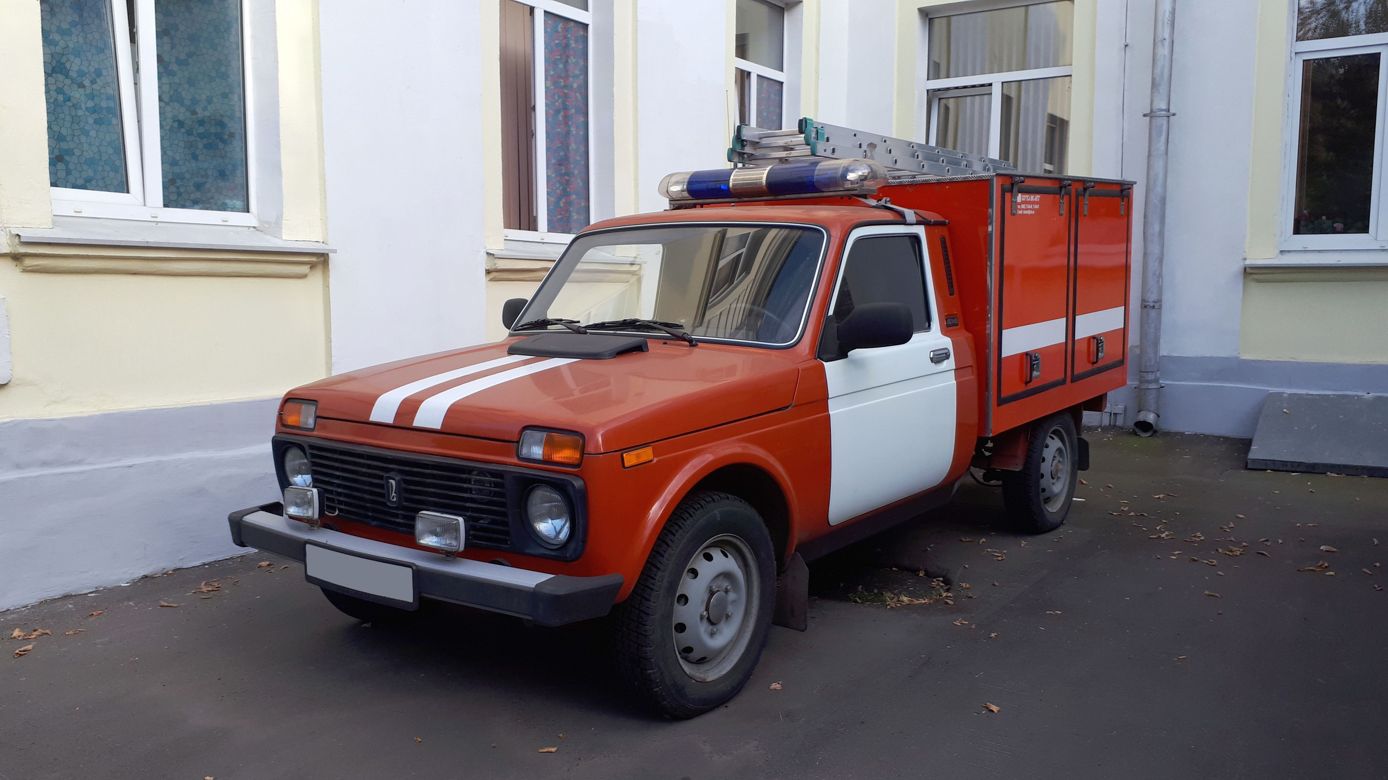 Пожарная машина на базе "Нивы".